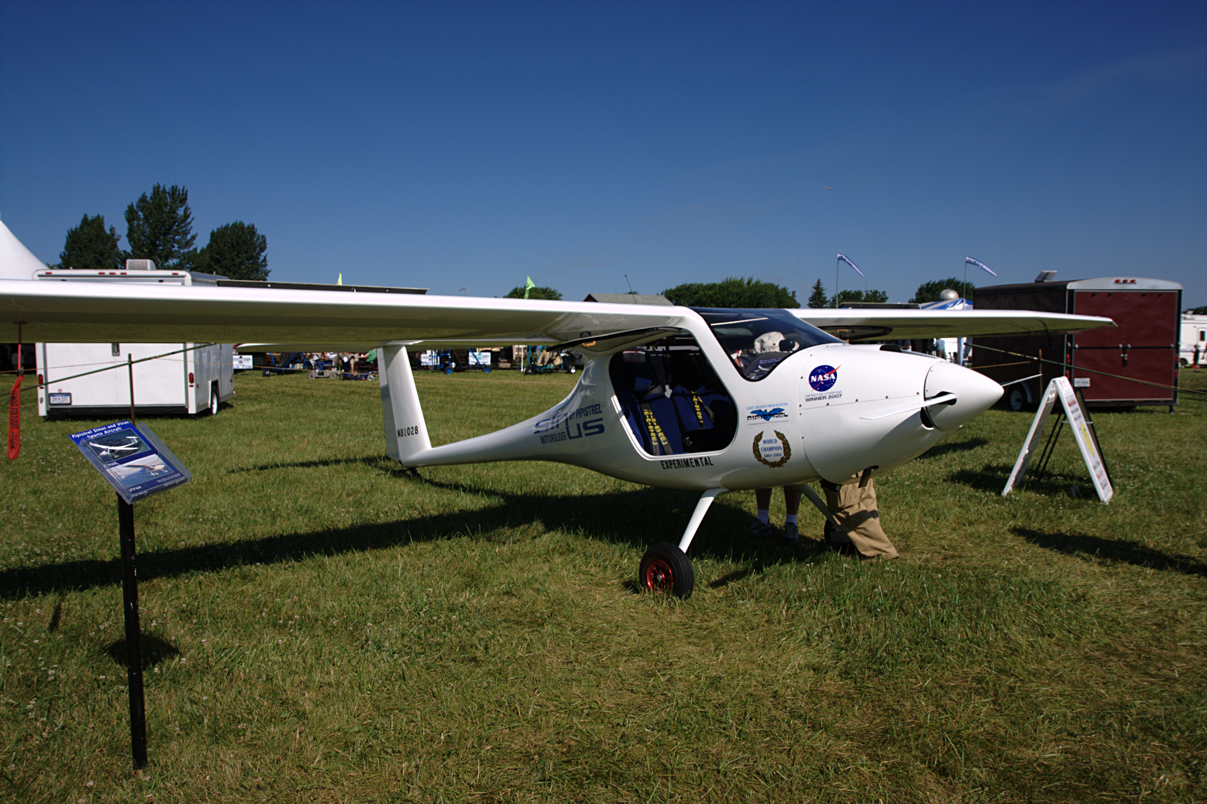 Pipistrel Sinus Motorglider